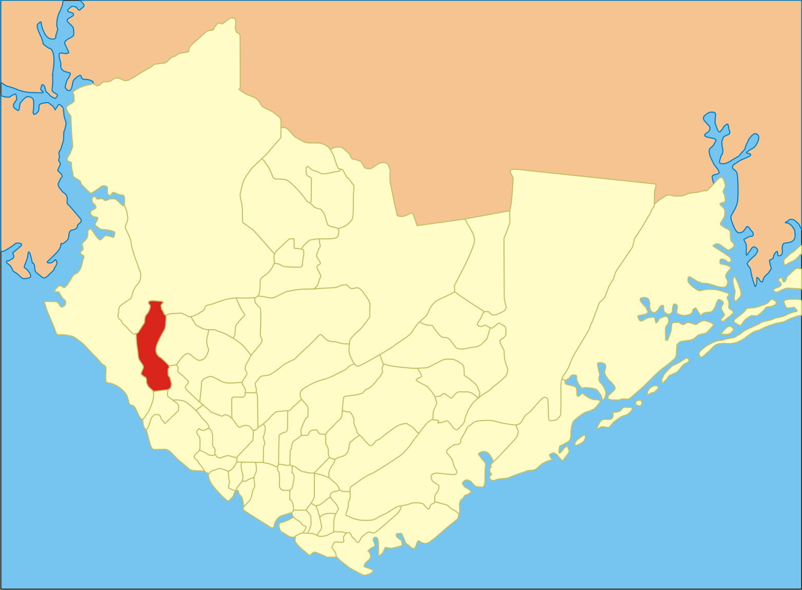 Localização do bairro em Manaus